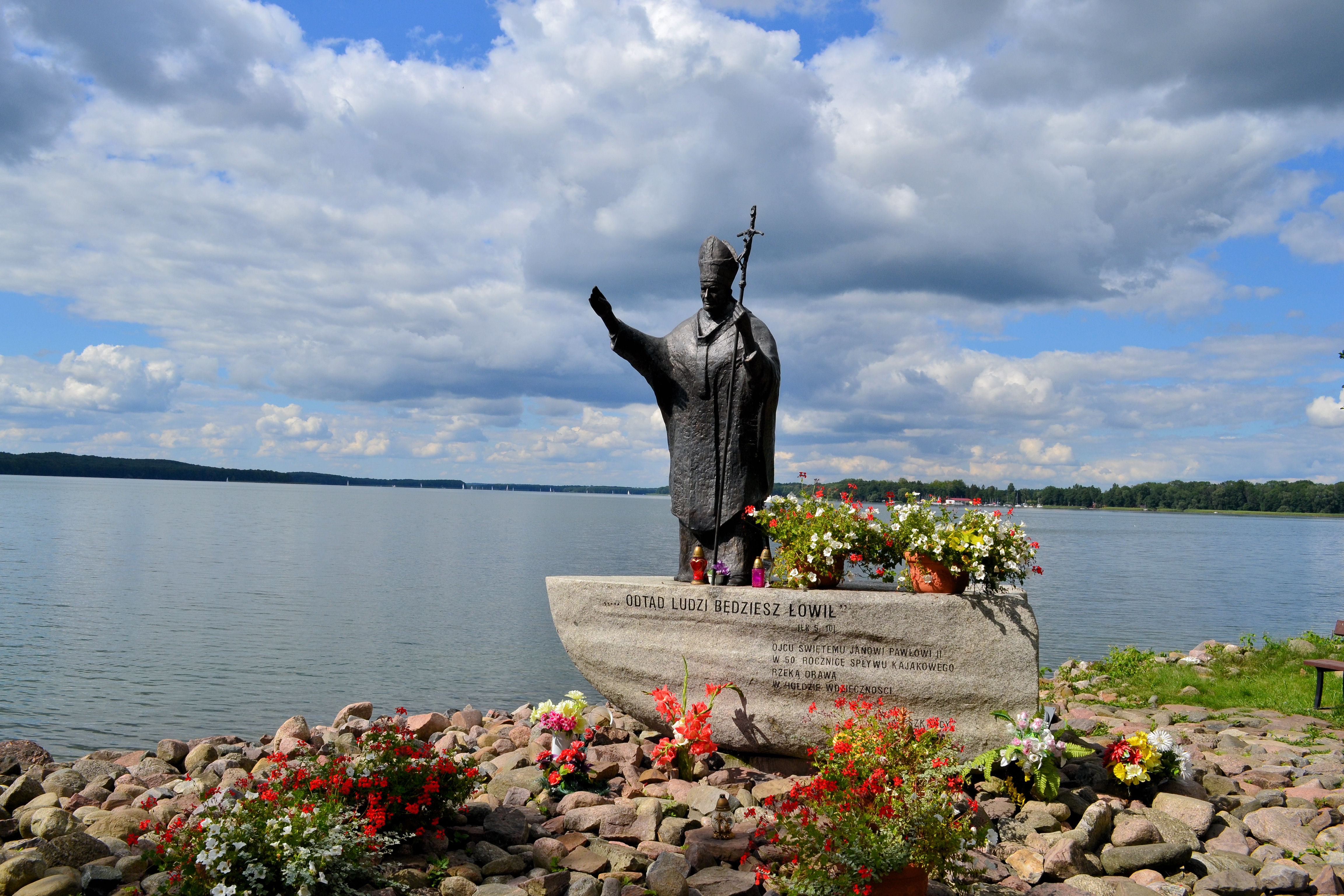 Pomnik Jana Pawła II w Czaplinku, nad jeziorem Drawsko